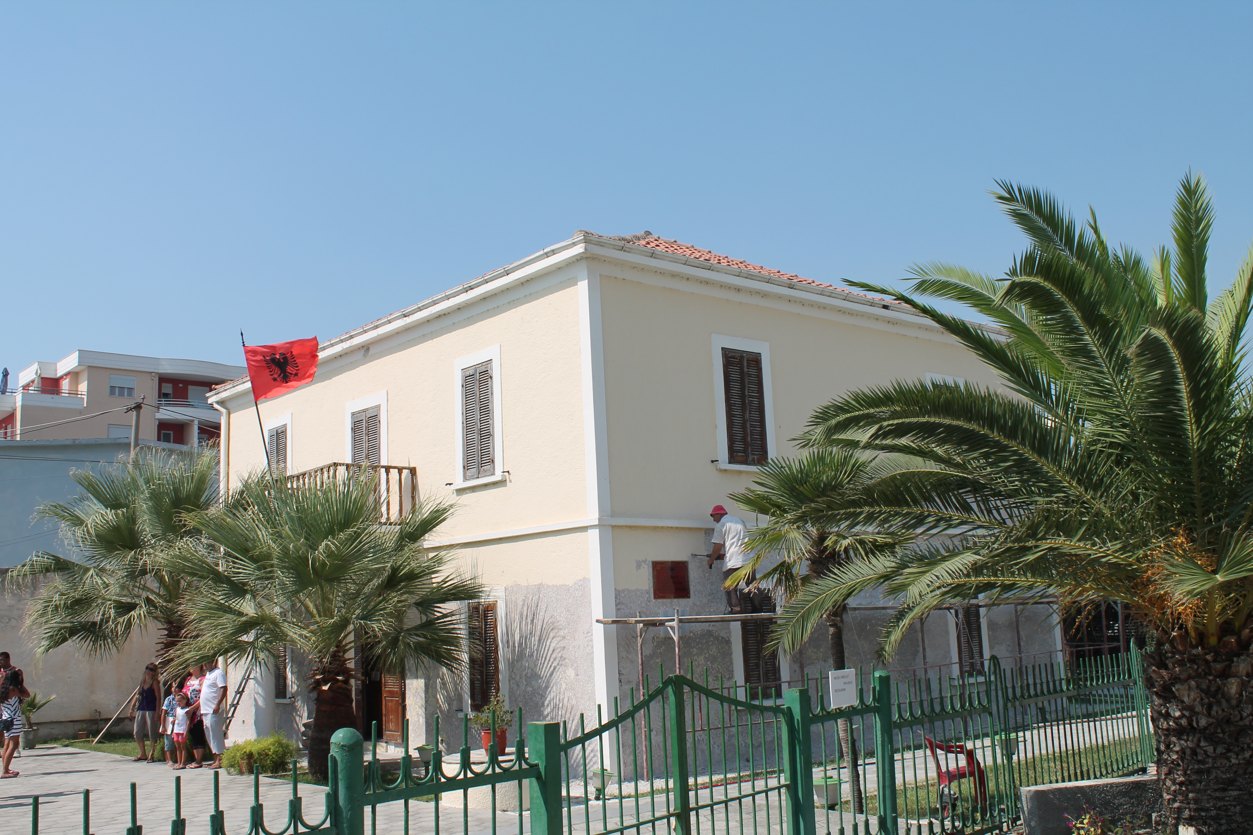 Godina Ku Ka Pasur Seline Qeveria Provizore E Ismail Qemalit